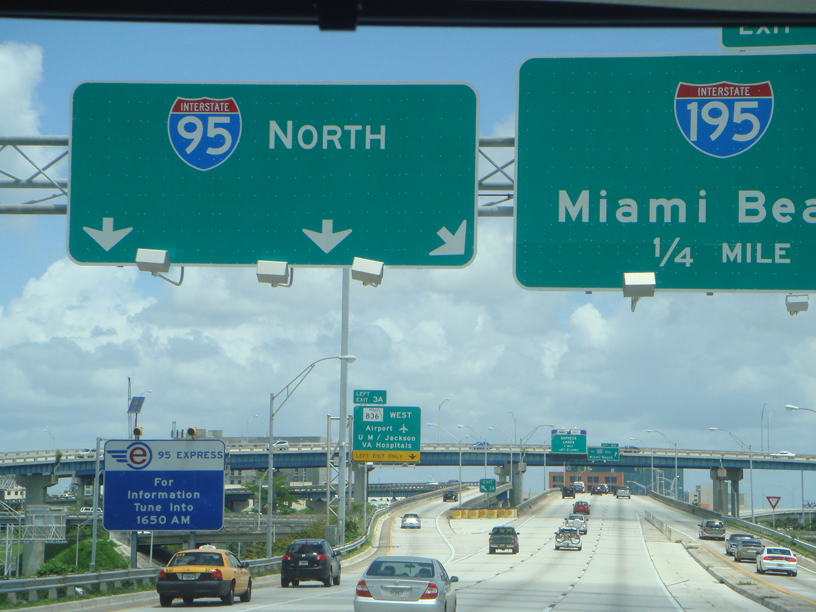 Interestatal 95 en Miami, FL. EE.UU.